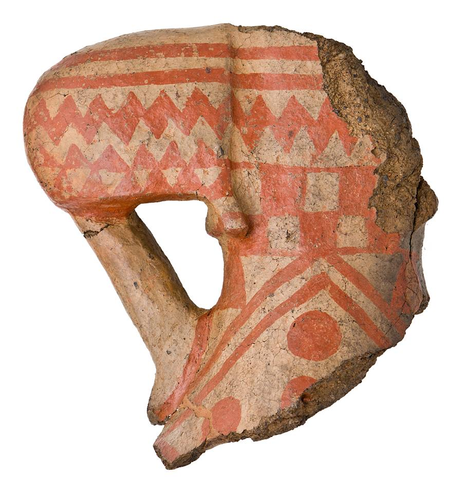 Fragmento de ídolo de los antiguos canarios hallado en Tara (Telde, Gran Canaria) en 1957